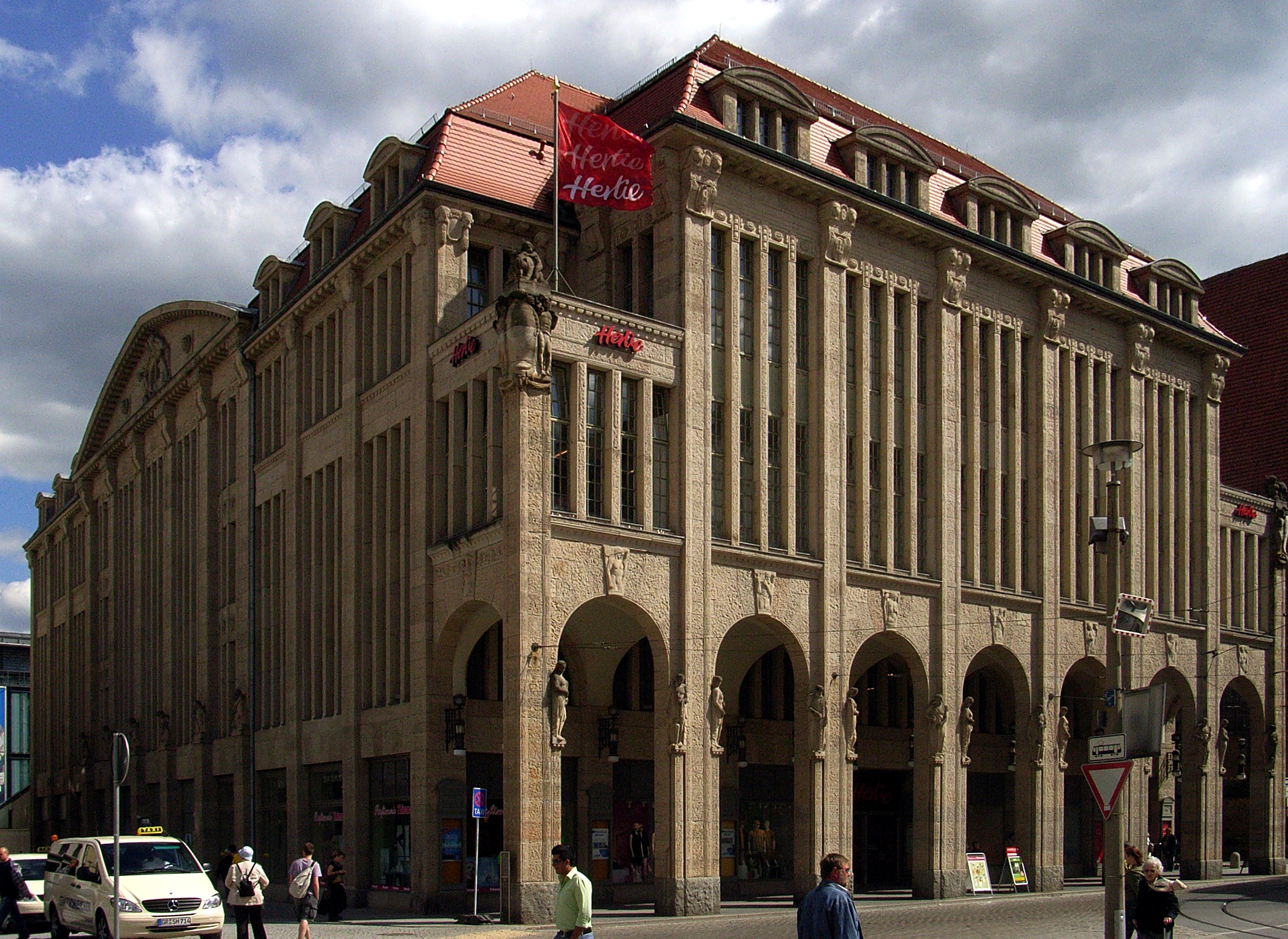 Aussenansicht des Jugendstilkaufhauses in Görlitz